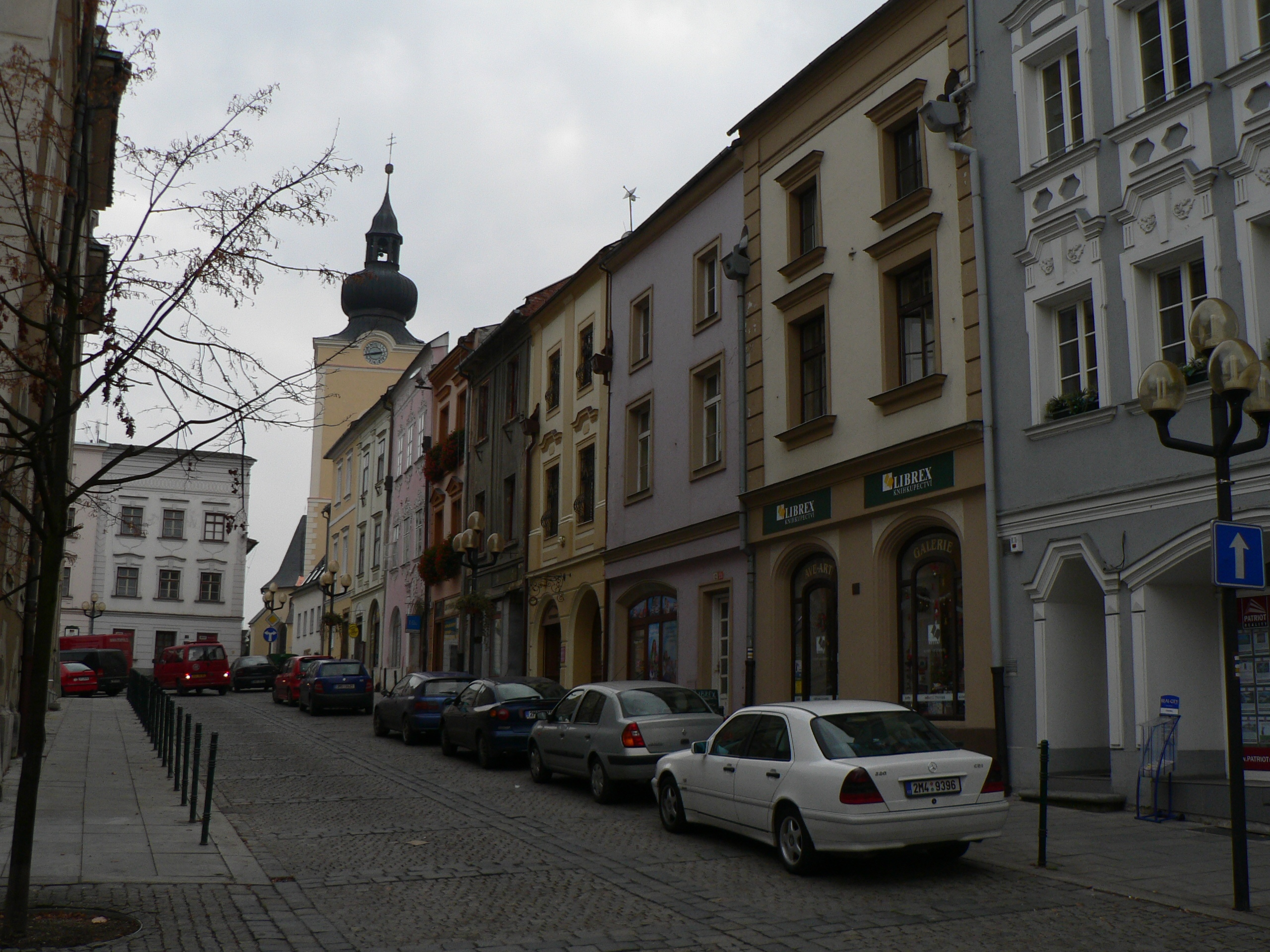 Domy na Náměstí Míru v Šumperku, naproti je čp. 5, vpravo pak čp. 6 až 13 (a kousek čp. 14).